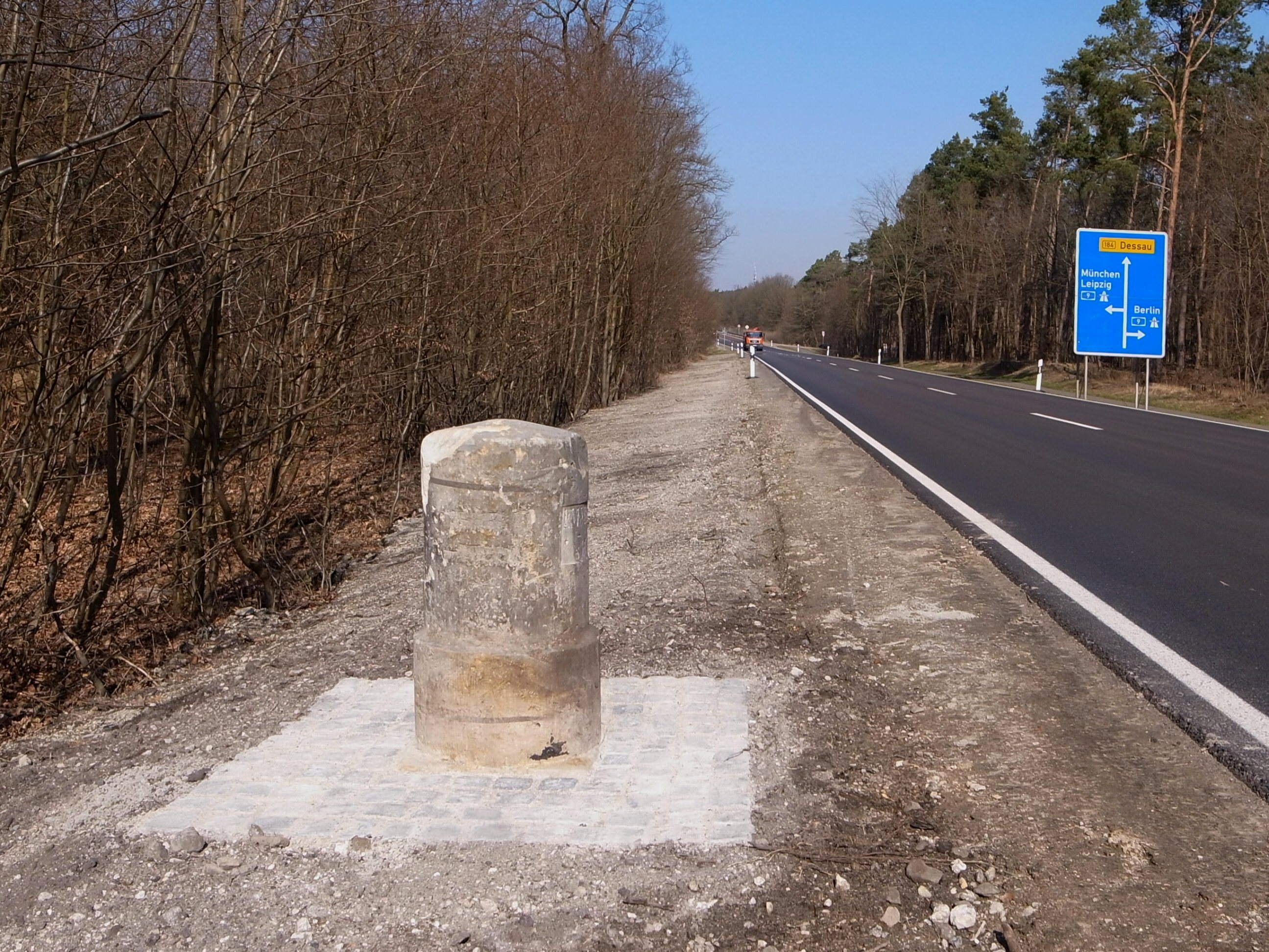 Lingenau, 1 Myriameter von Dessau. Gut sichtbar, aber beschädigt, nach der Erneuerung der B184 zwischen Dessau und Bobbau neu aufgestellt.